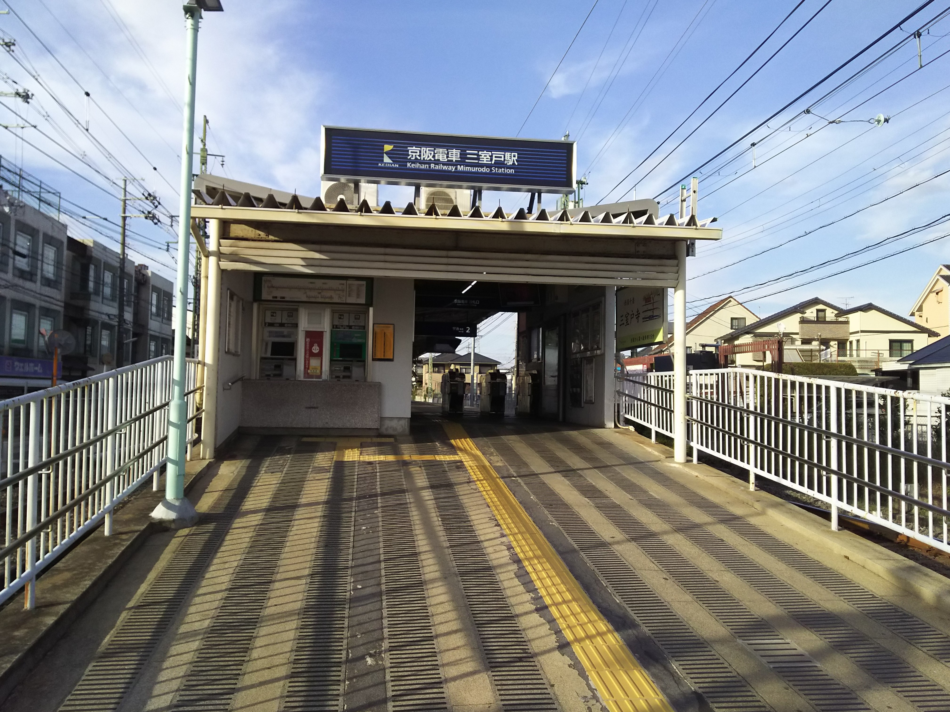 京阪宇治線三室戸駅駅舎（京都府宇治市）